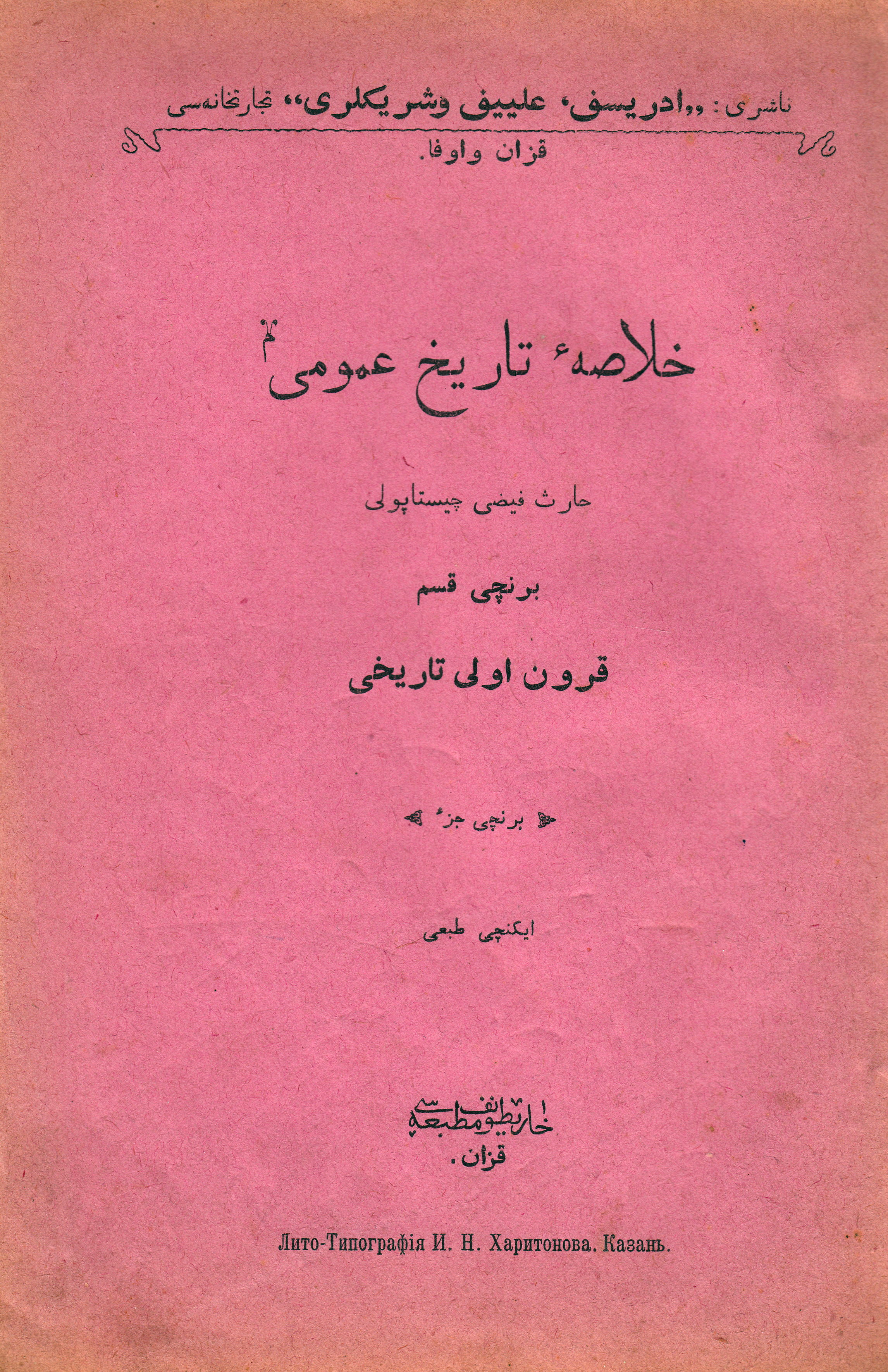 Татарча/tatarça: Çistapuli Xaris Fayzi. Xölasa-i tarix ğomumi. Berençe qıysem.